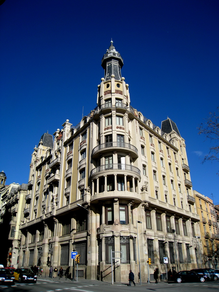 (1921) Antic edifici d'oficines de la companyia Transmediterrània, obra de Juli Maria Fossas i Martínez, a la Via Laietana, 2 (Barcelona-Catalunya).